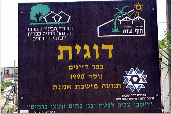 דוגית התמונות באדיבות קטיף.נט (קישור) אתר האינטרנט של גוש קטיף. צילם: מוטי סנדר.